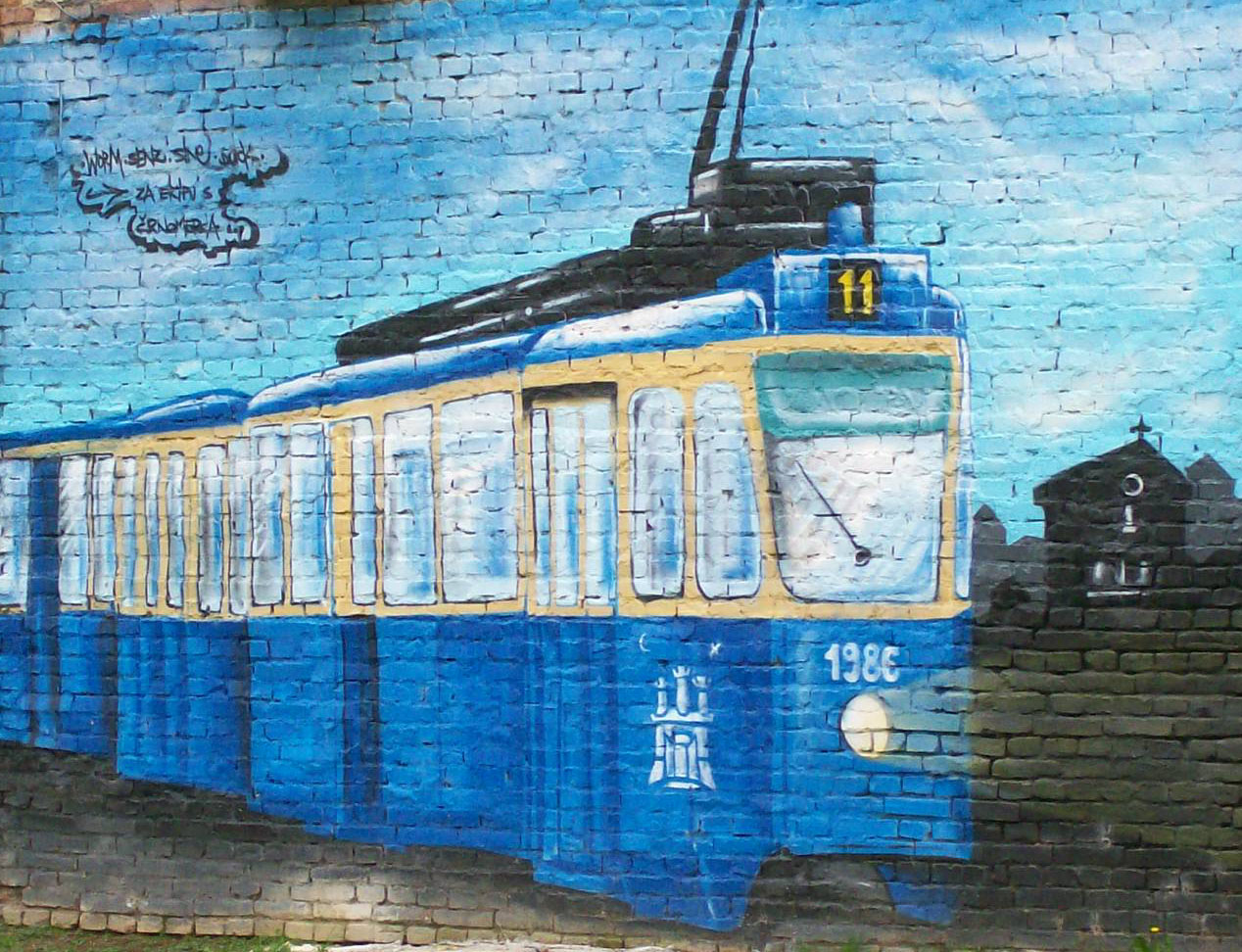 Grafit Dinamo Črnomerec